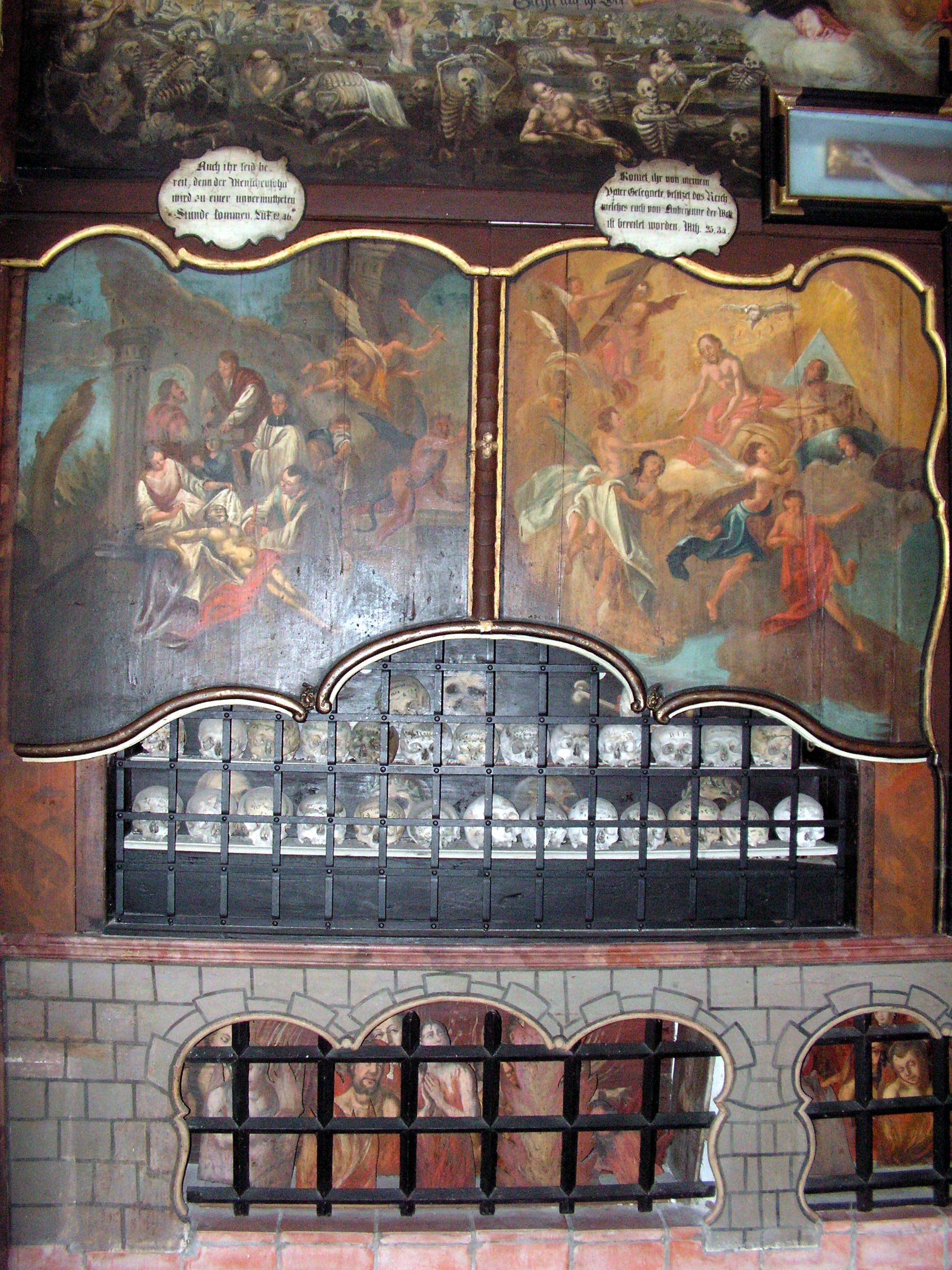 Karner an der Erasmikapelle in Dingolfing